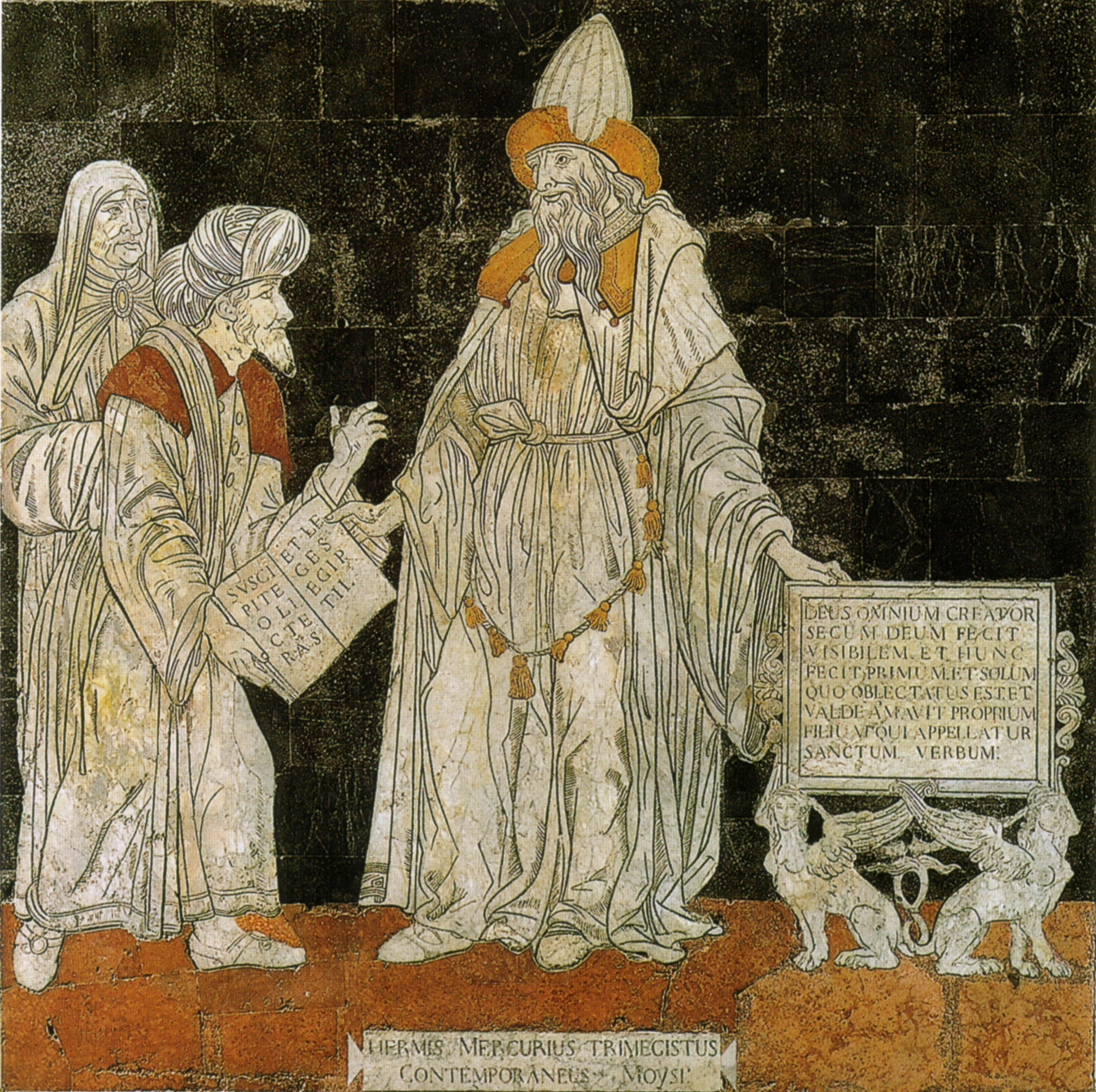 Pavimento di siena, ermete trismegisto (giovanni di stefano)